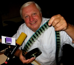 Axel Brücker à France-Culture.